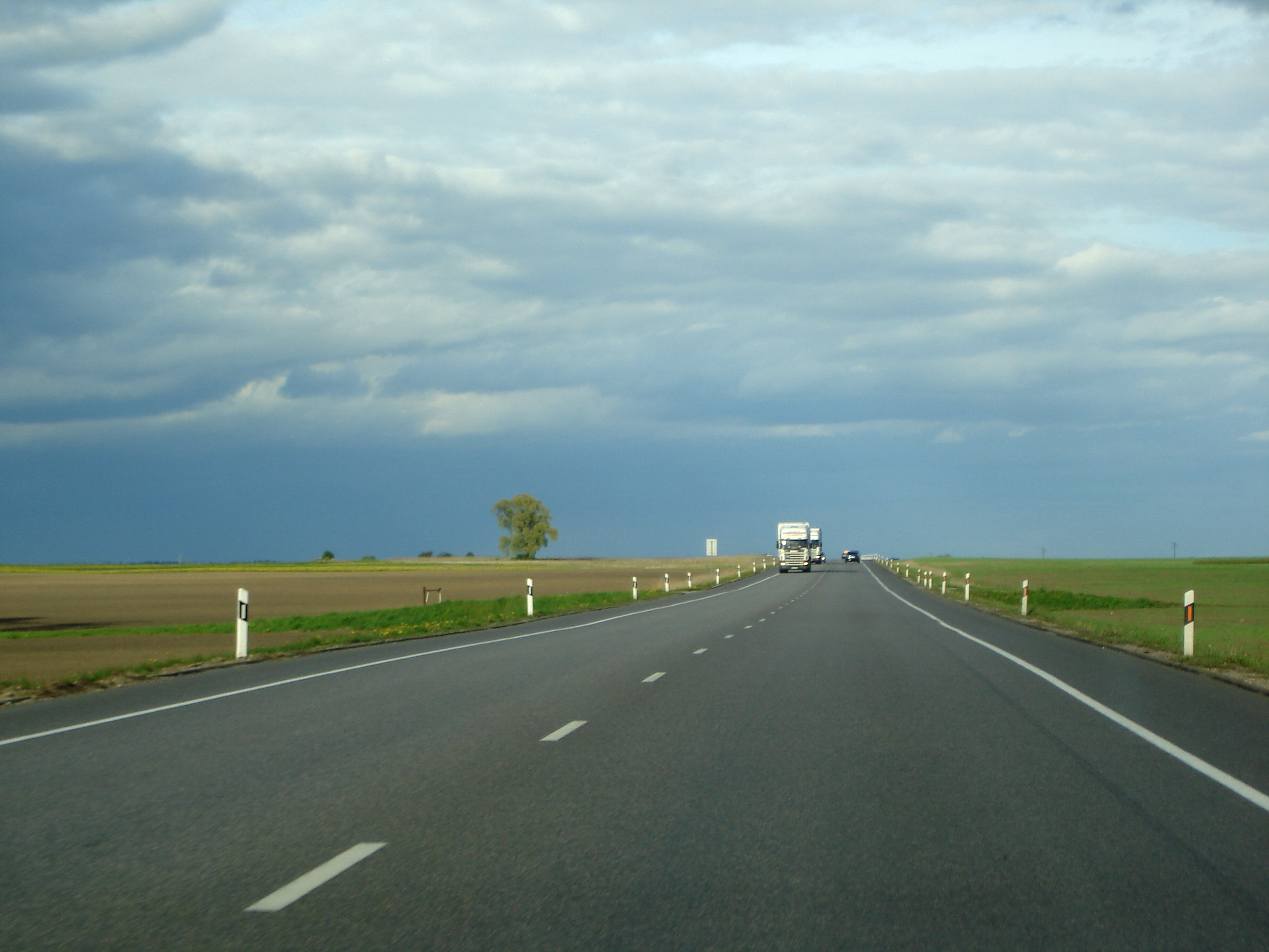 Litauen: Europastraße 67 (A5) zwischen Marijampolė und Kaunas